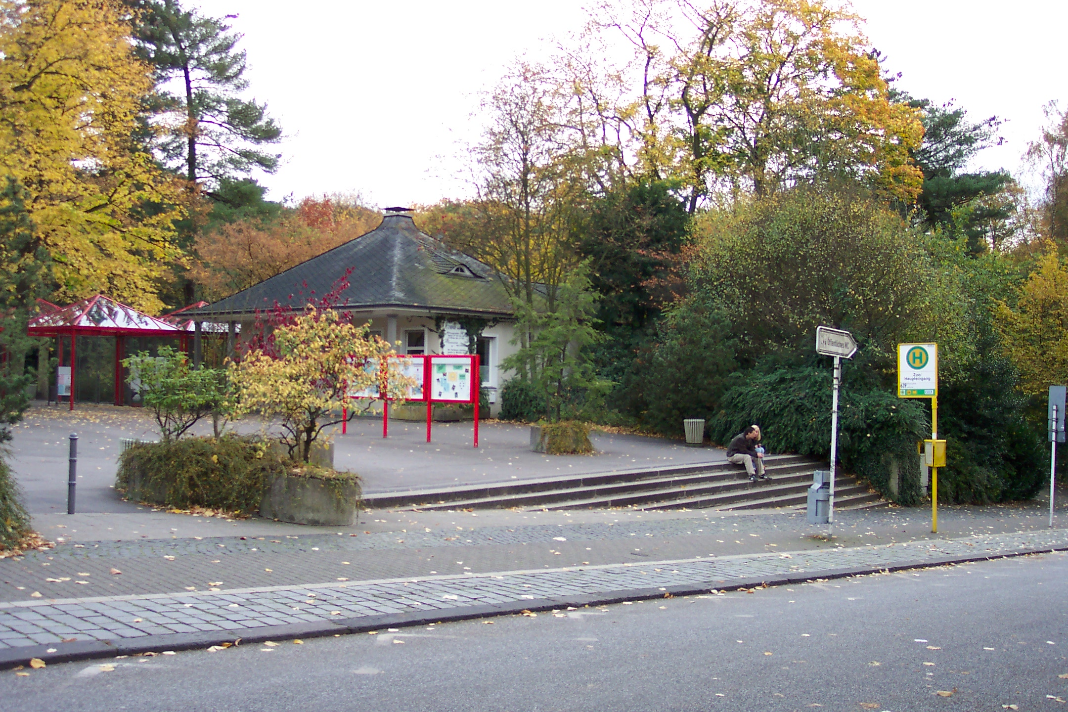 Wuppertaler Zoo, Wuppertal